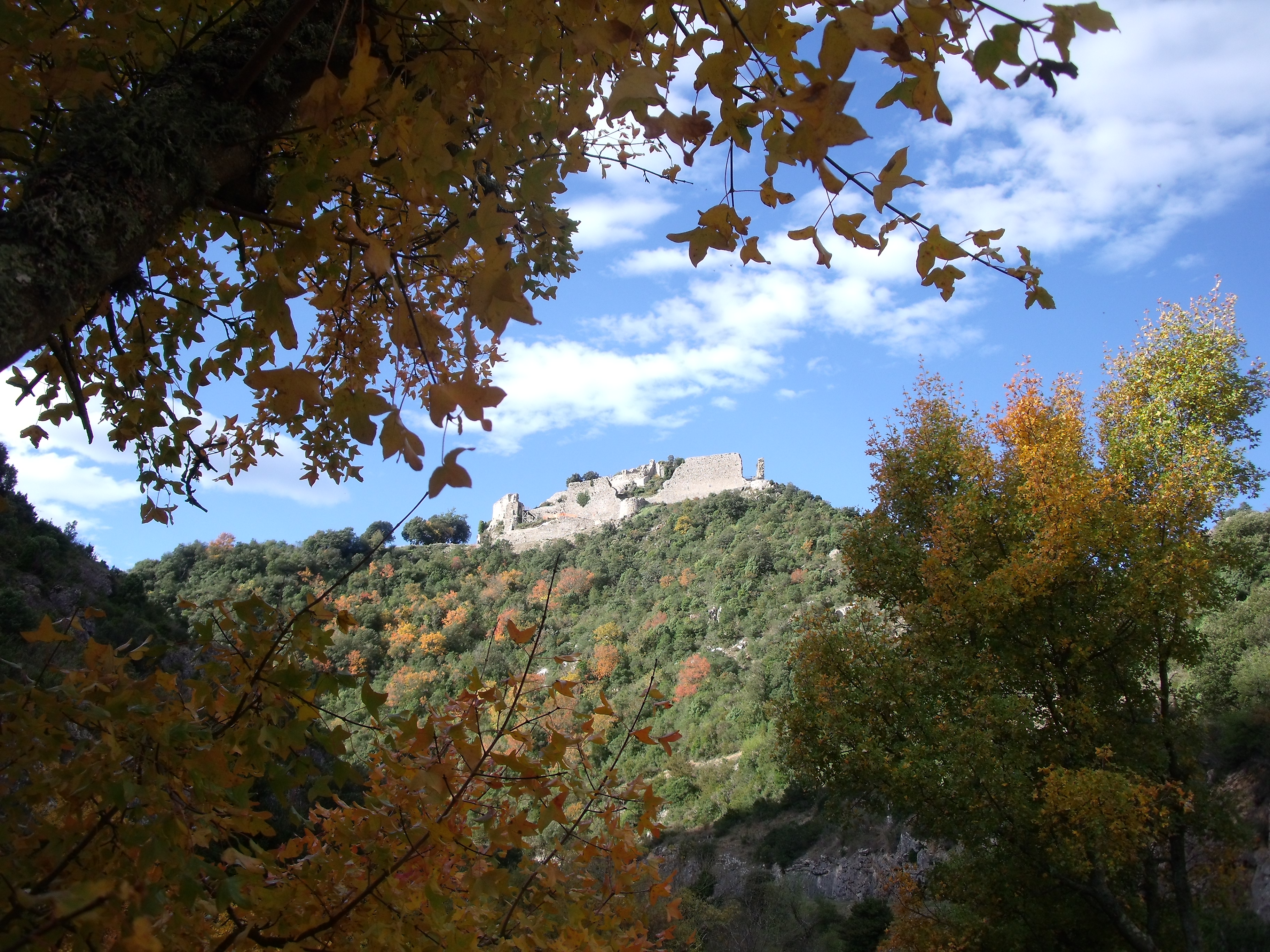 Vue du château de Termes depuis le canyon du Sou au nord-est, près de la route D 40. .